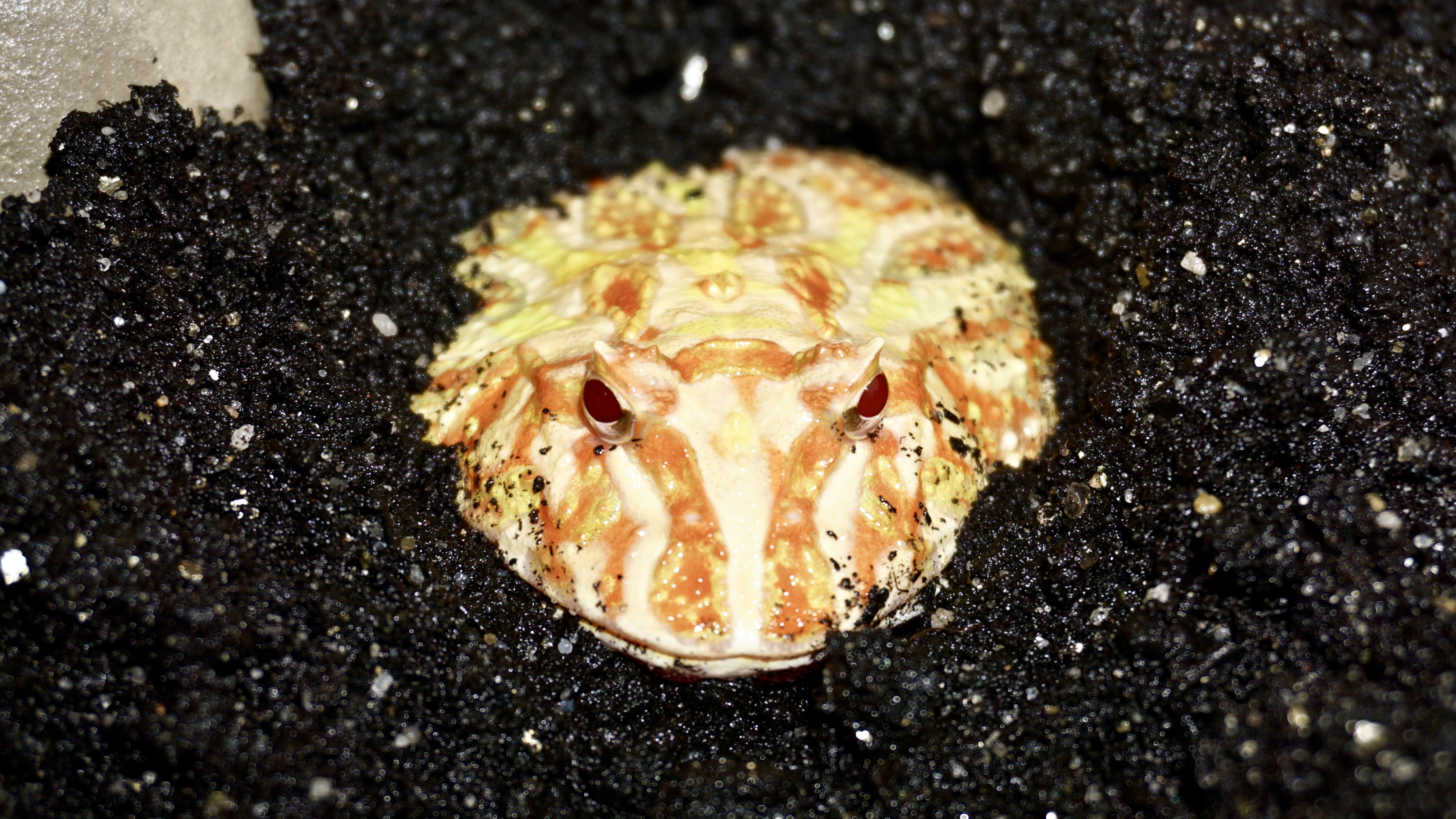 Ceratophrys cranwelli albinos